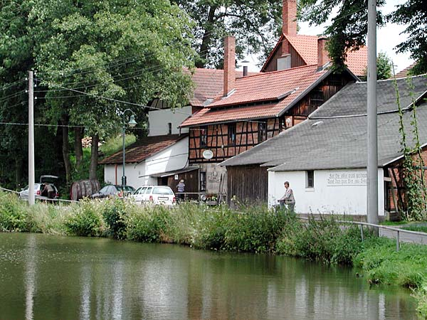 Singen (Thüringen), Museumsbrauerei Hier wird noch mit Herz und Hand gebraut